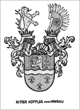 Exlibris des k.u.k. Hof- und Gerichtsadvokaten Dr. Karl Koppler von Inngau (1844–1918), auf den 1883 der Ritterstand, das Prädikat "von Inngau" und das Wappen seines Schwiegervaters Karl Wagner von Inngau (1819–1893, Präsident des Handelsgerichts in Wien) übertragen wurden.